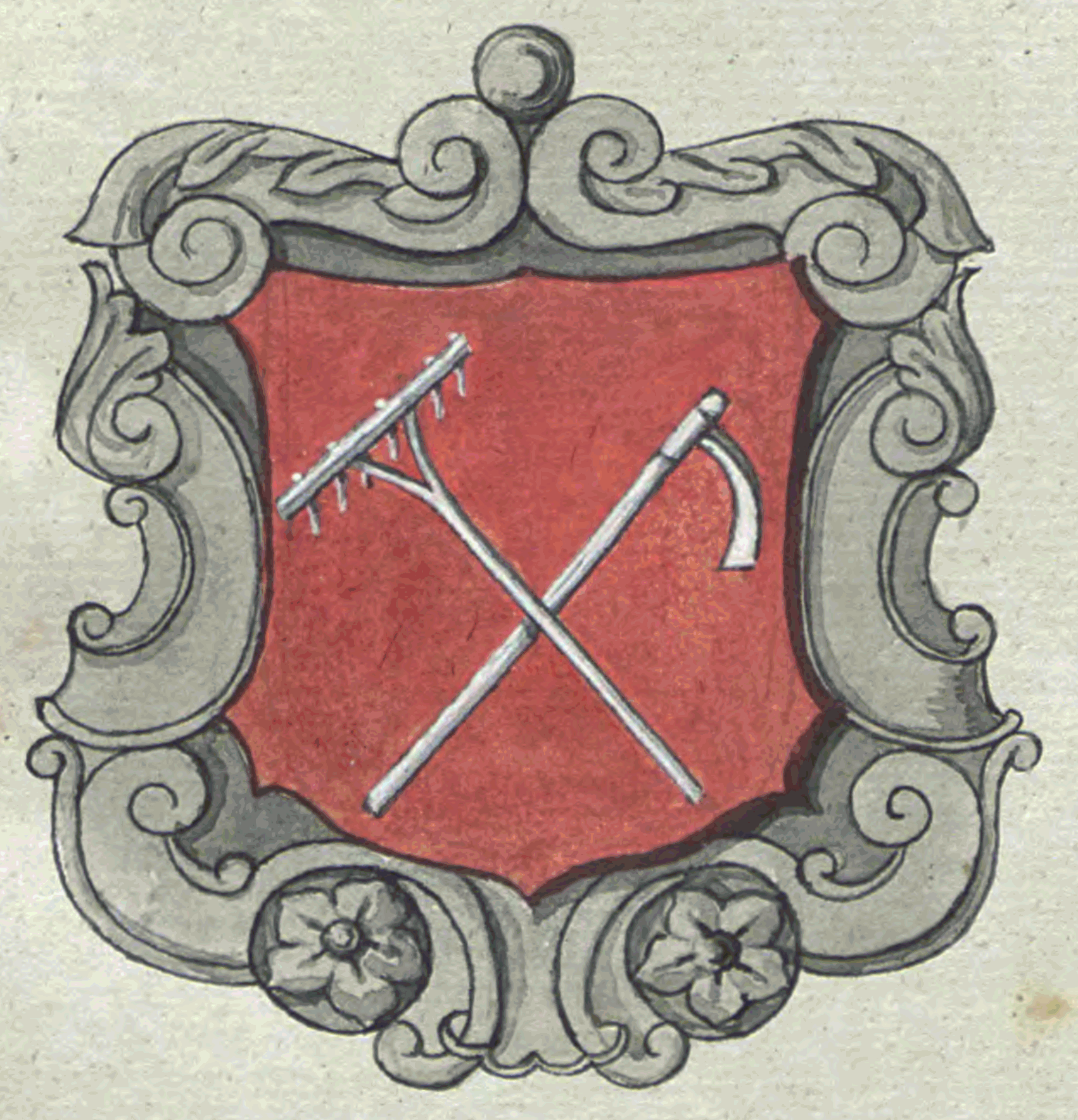 Wappen des Ortes Troplowitz (Opavice) in Österreichisch-Schlesien.